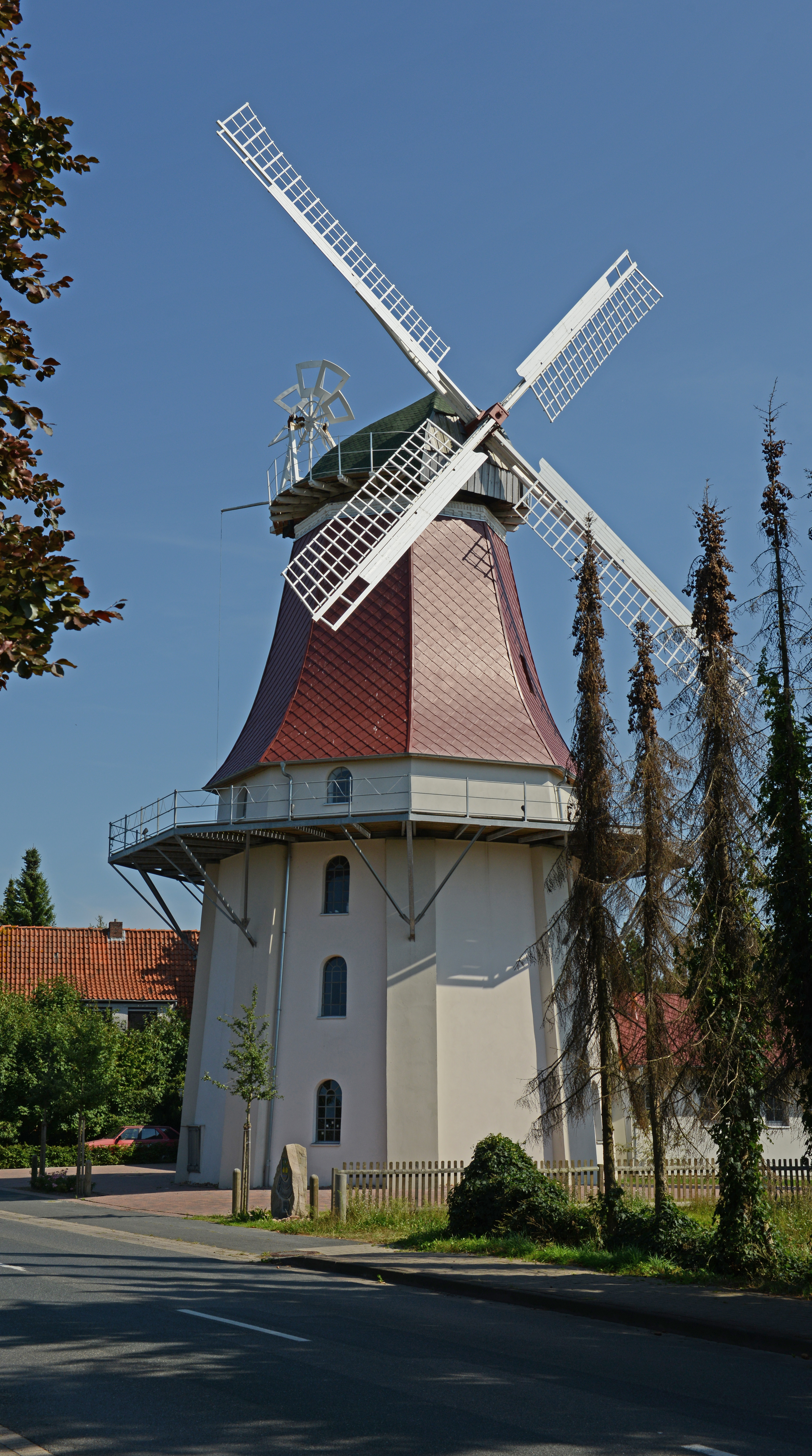 Baudenkmal in Emtinghausen, Mühle